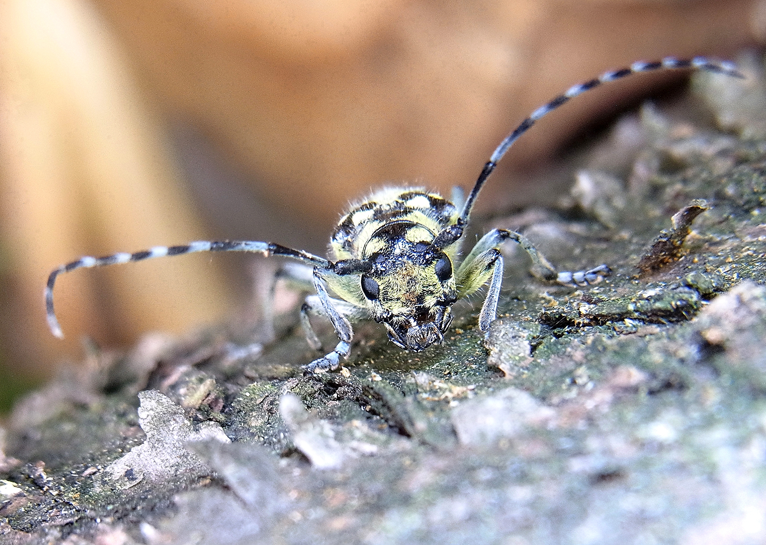 Saperda scalaris from Hungary, Börzsöny-mountains Törökmezö at cut cherry 2015-06-21